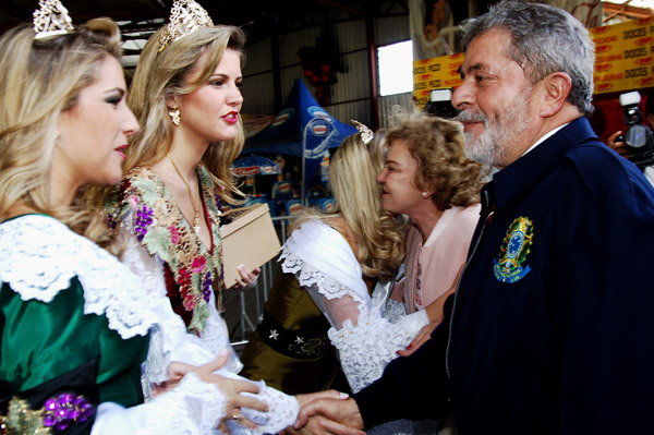 Lula e membros da comunidade ítalo-brasileira de Caxias do Sul .